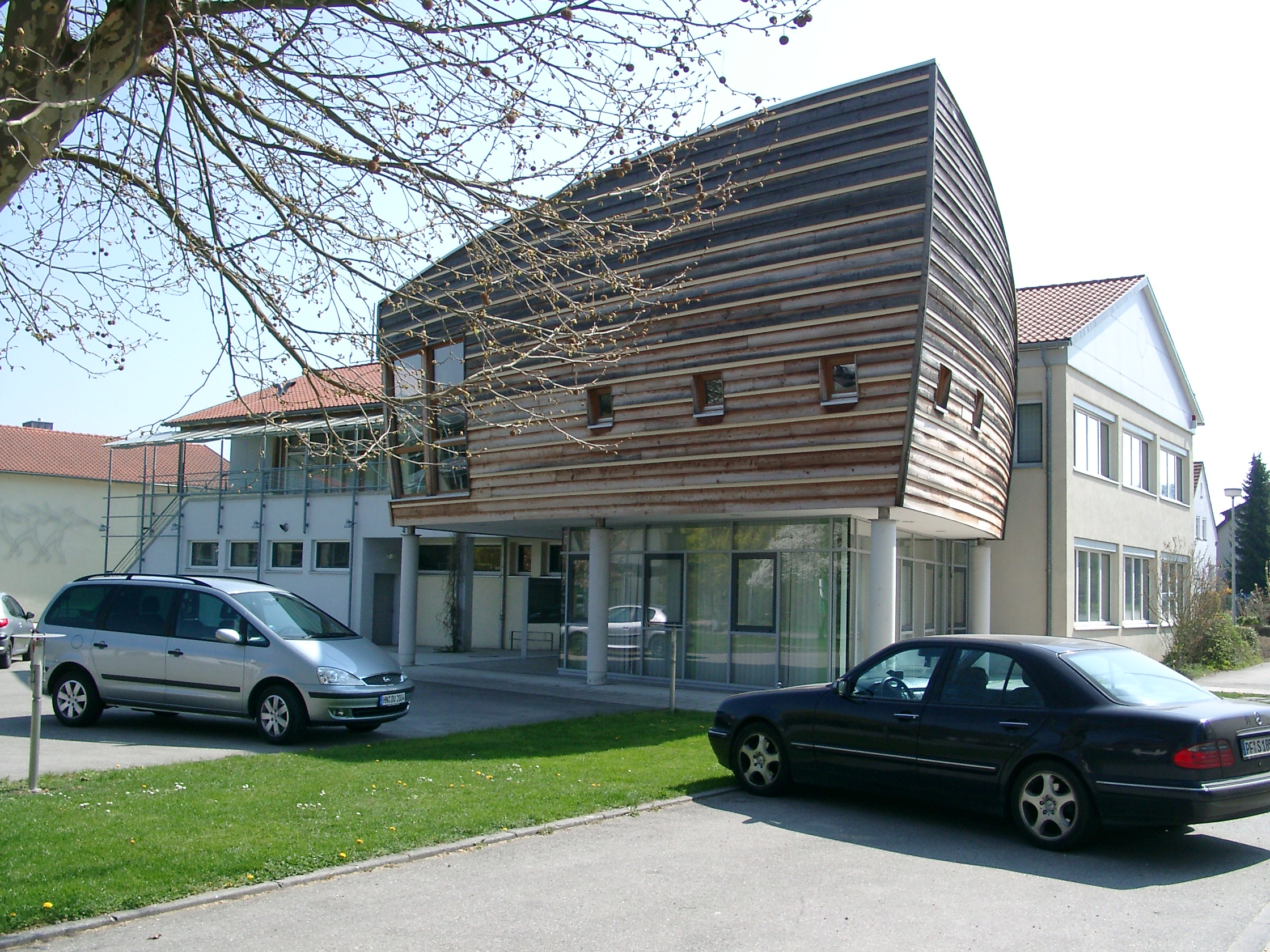 Pfaffenhofen (Baden-Württemberg), Rathaus